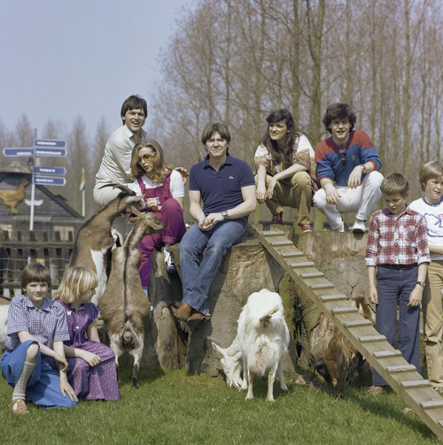 De Oostenrijkse groep Blue Danube tijdens een fotosessie voor het Eurovisie Songfestival 1980